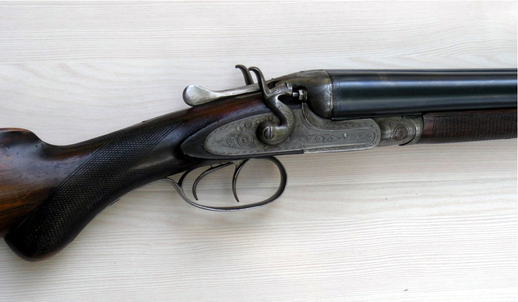 Hahn Doppelflinte